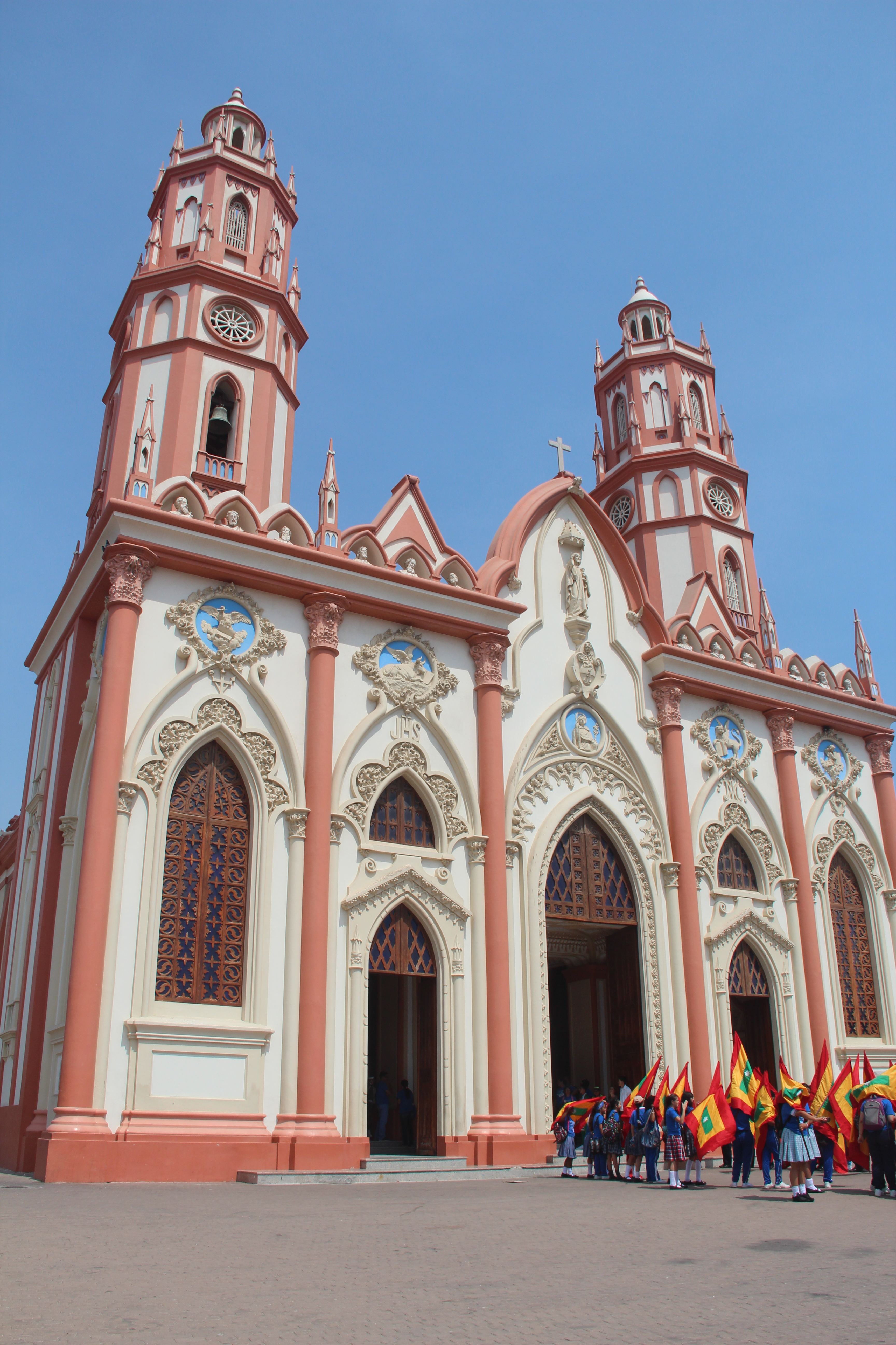 Iglesia de San Nicolás de Tolentino Barranquilla renovada, imagen tomada en abril de 2014